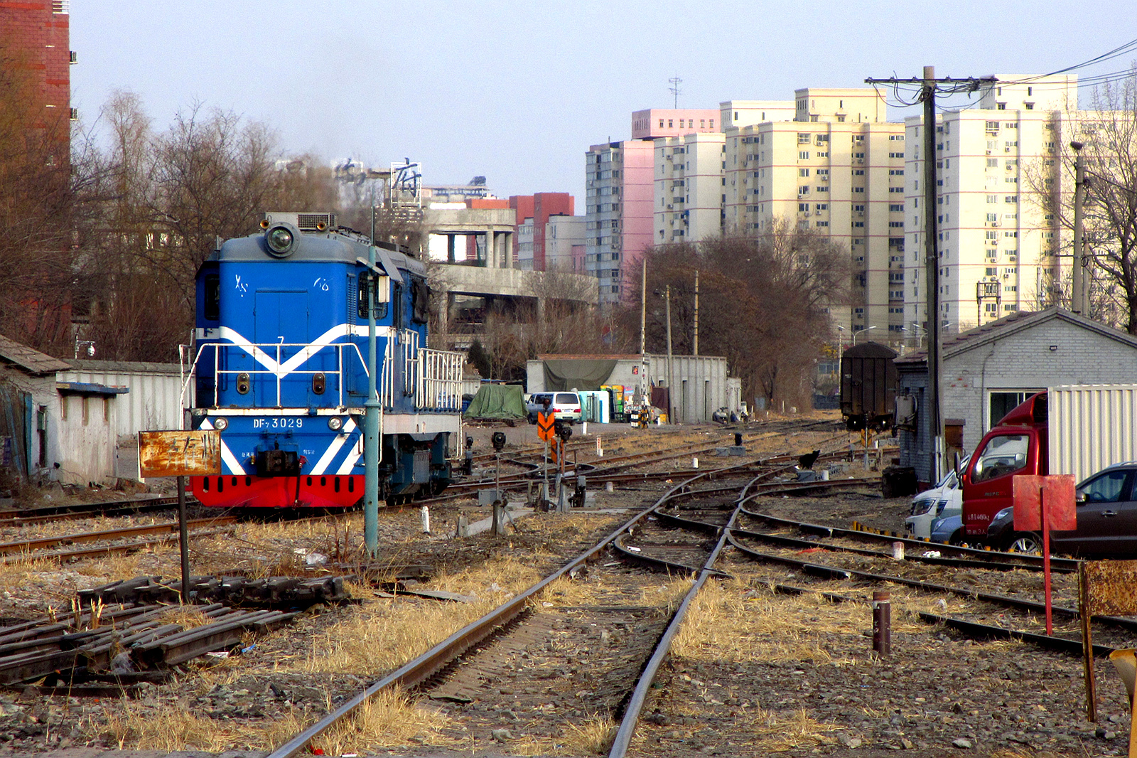 DF7B-3029号机车于五路站内